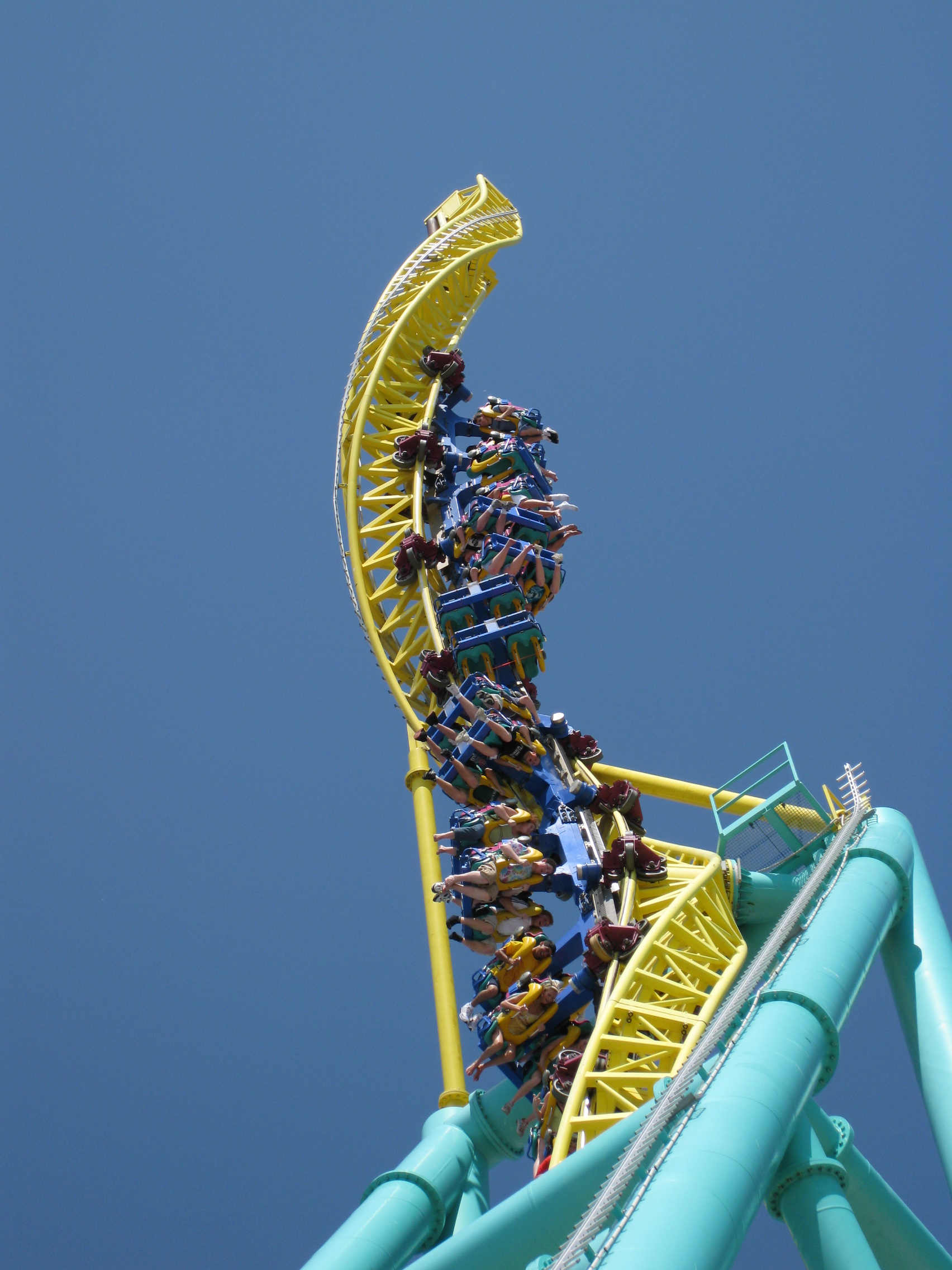 an amusement park ride